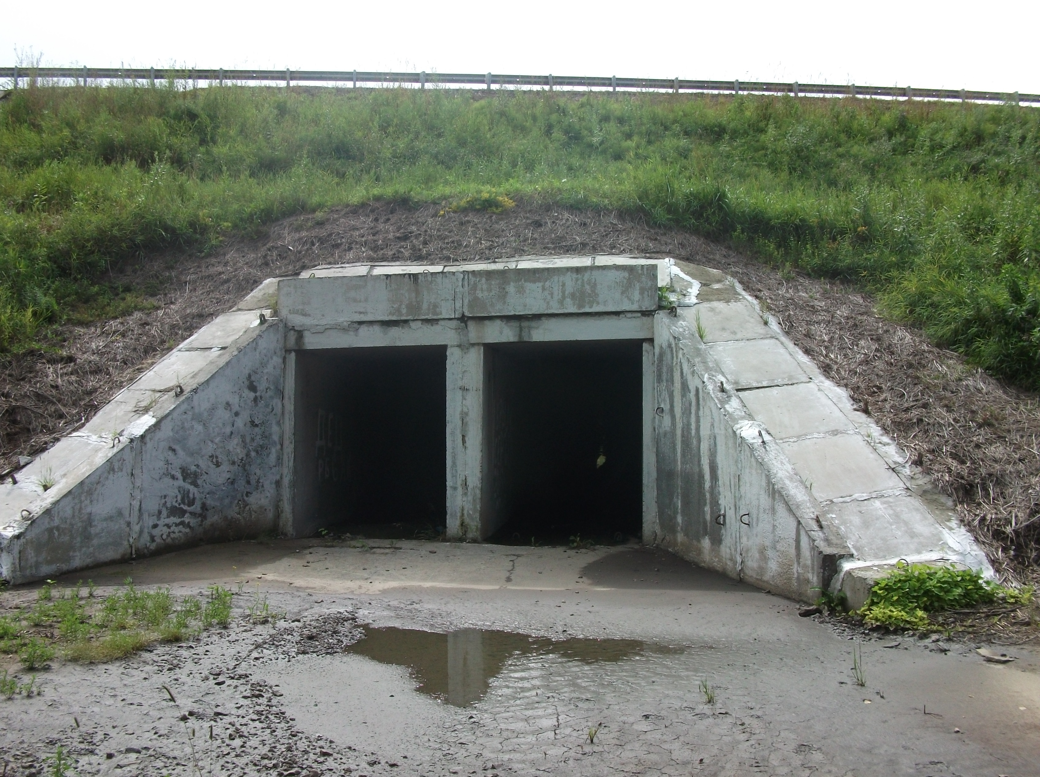 Двухочковая прямоугольная труба